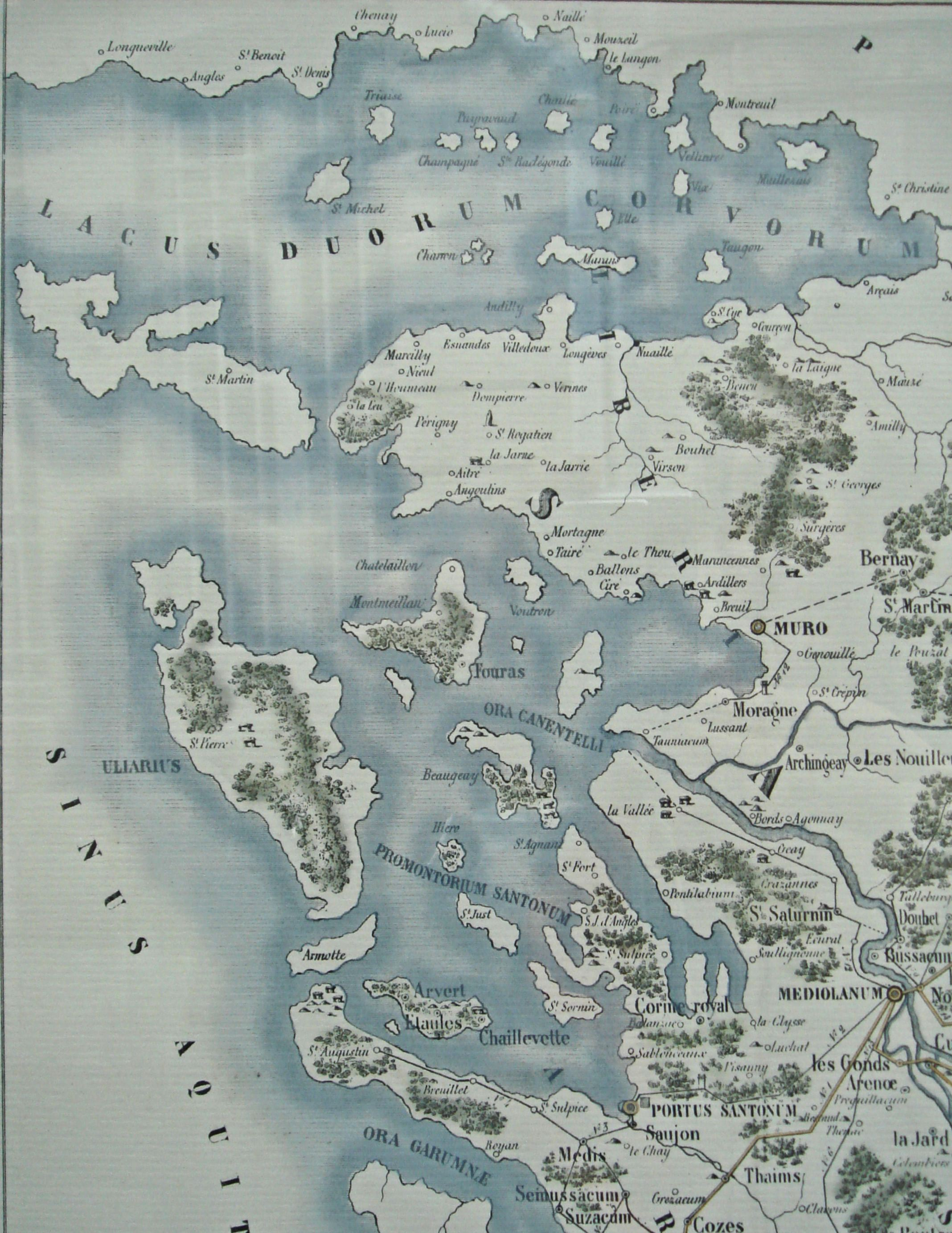 Carte_du_pays_de_Santones_sous_les_Romains_Pertuis_d_Antioche